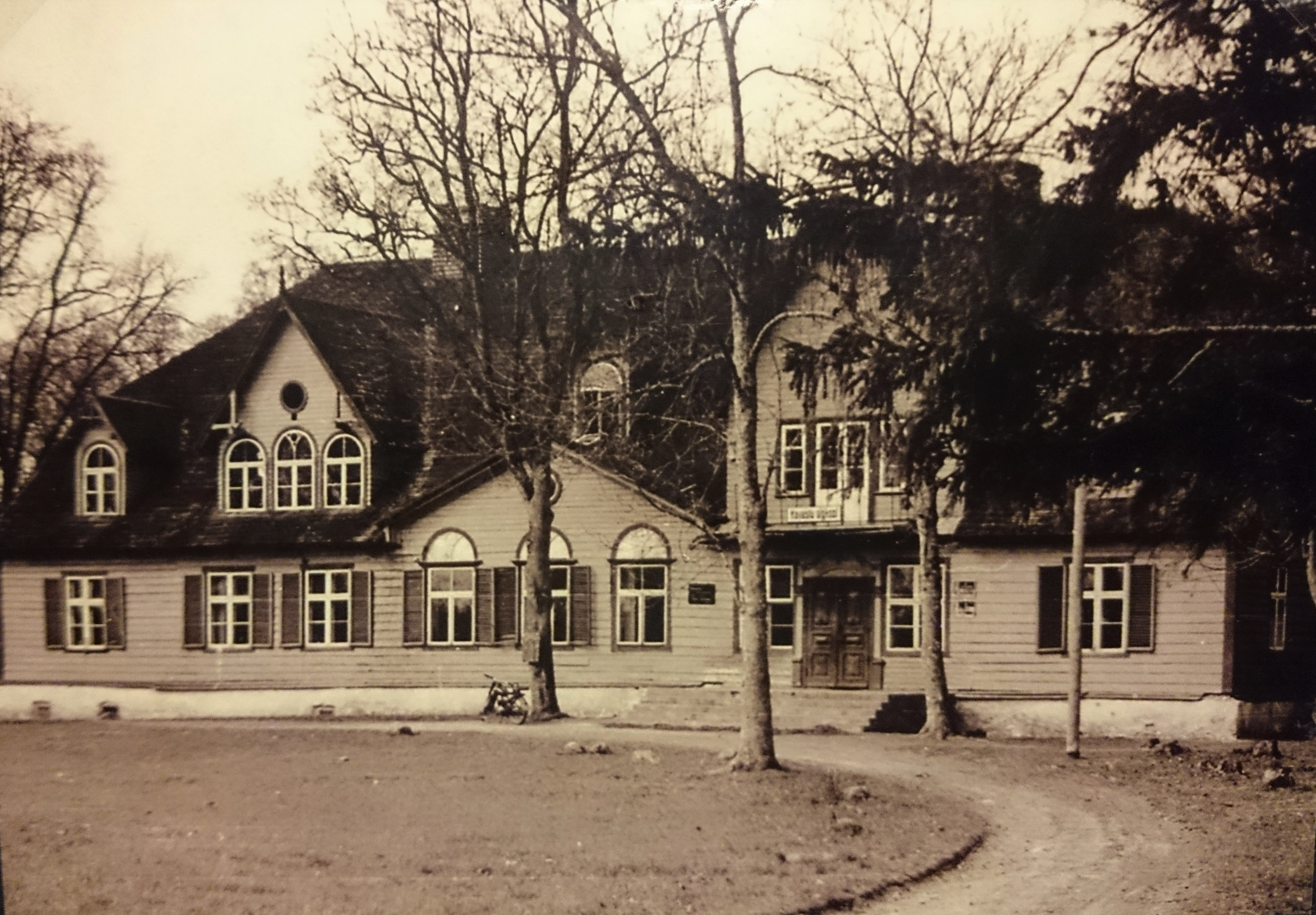 Kavastu algkool endises Kavastu mõisa härrastemajas 1921-1968